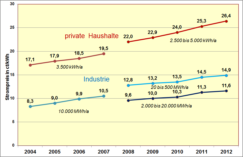 Entwicklung der Strompreise in Deutschland zwischen 2004 und 2012 für private Haushalte und Industrie